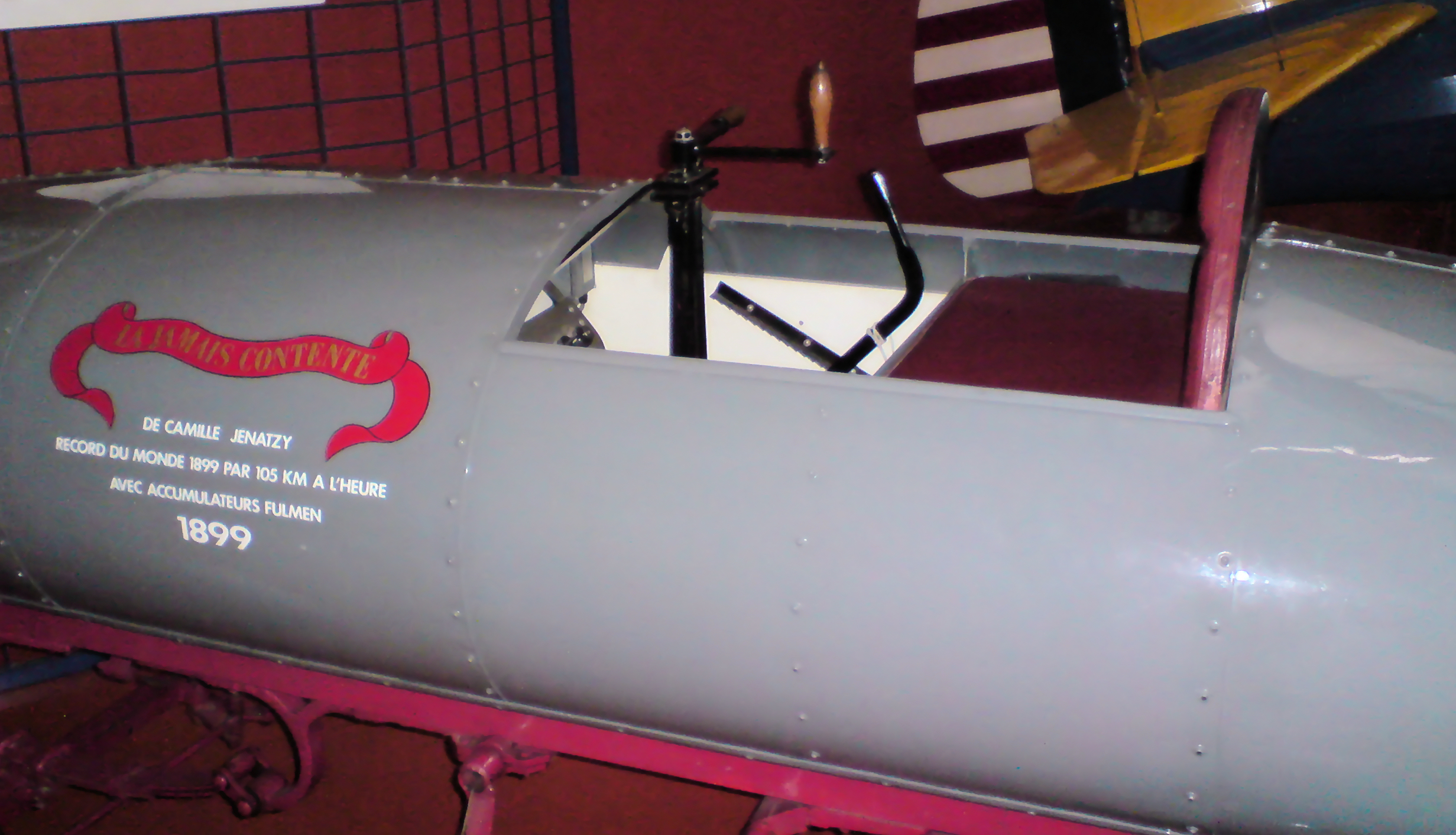 La "Jamais-Contente", première voiture à atteindre les 100 km/h en 1899 -- à propulsion électrique.